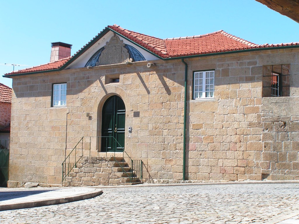 Aspecto da fachada